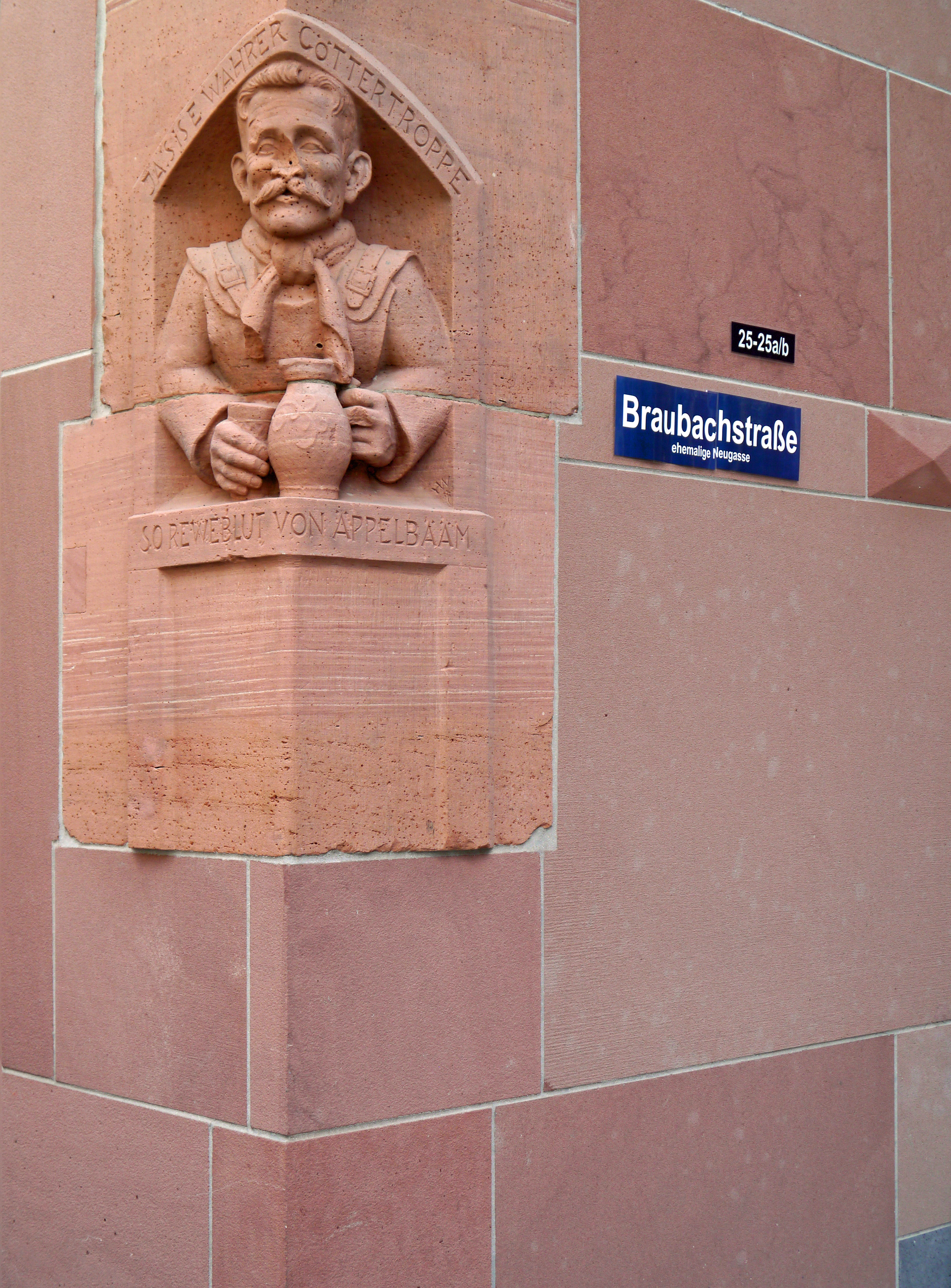 Spolie "Der Apfelweintrinker" von 1940: JA 'S IS E WAHRER GÖTTERTROPPE, SO REWEBLUT VON ÄPPELBÄÄM (deutsch: Ja es ist ein wahrer Göttertropfen, so ein Rebenblut (= der Apfelsaft) von Apfelbäumen) , 2018 am Haus Braubachstrasse 23 - Ecke "Neugasse" in der Neuen Frankfurter Altstadt.